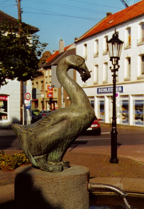 Gangelt Muurepenn